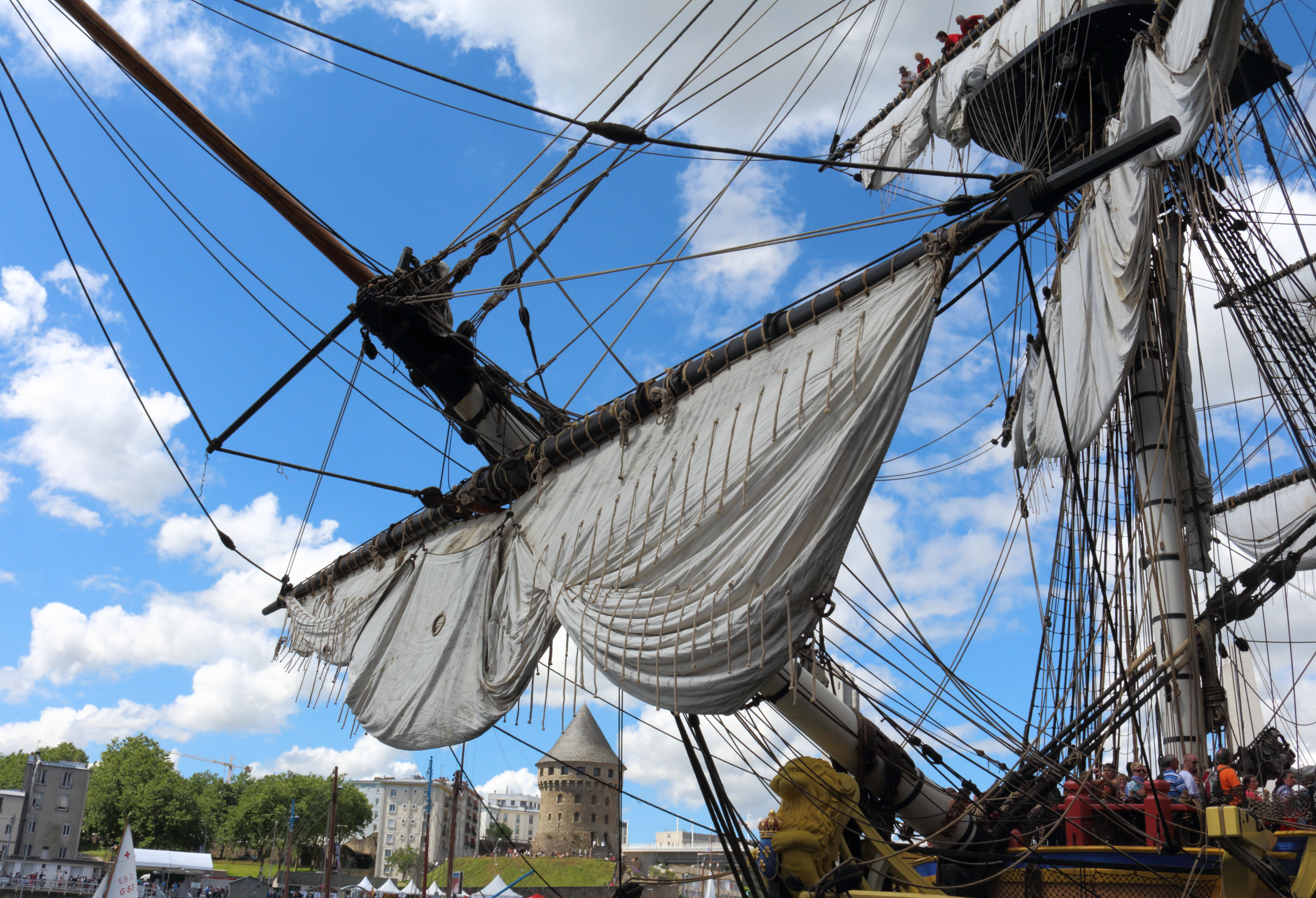 La civadière de l'Hermione (photo prise dans le port de Brest, 14 juillet 2016).